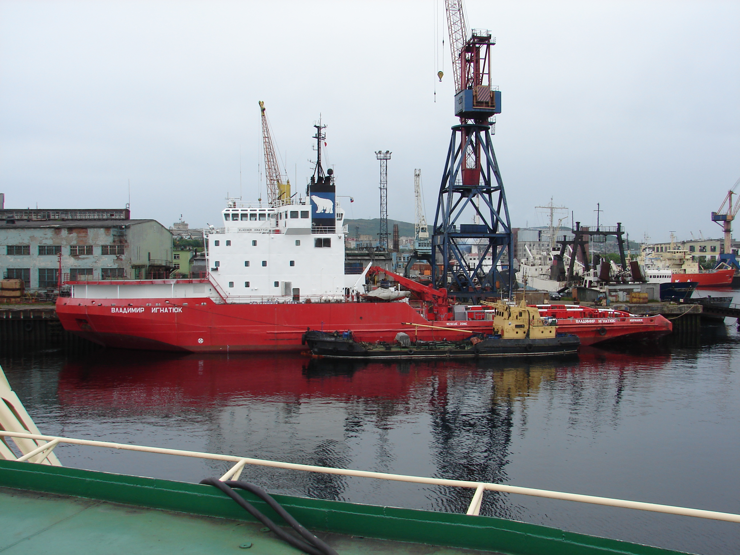 Ледокол Владимир Игнатюк